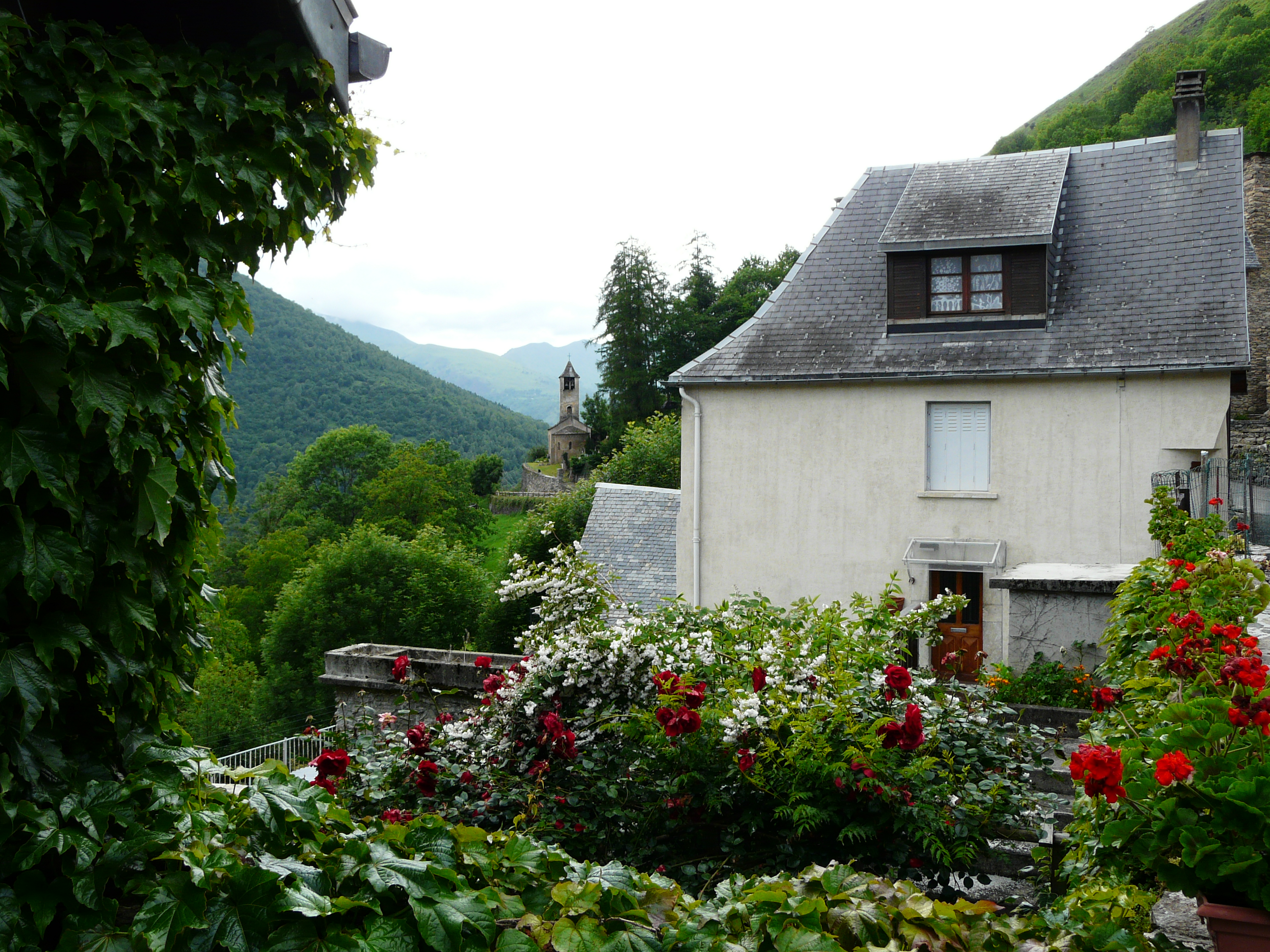 Le village de Cazaril-Laspènes vu depuis l'est, Haute-Garonne, France. Au fond, l'église Saint-Martin.